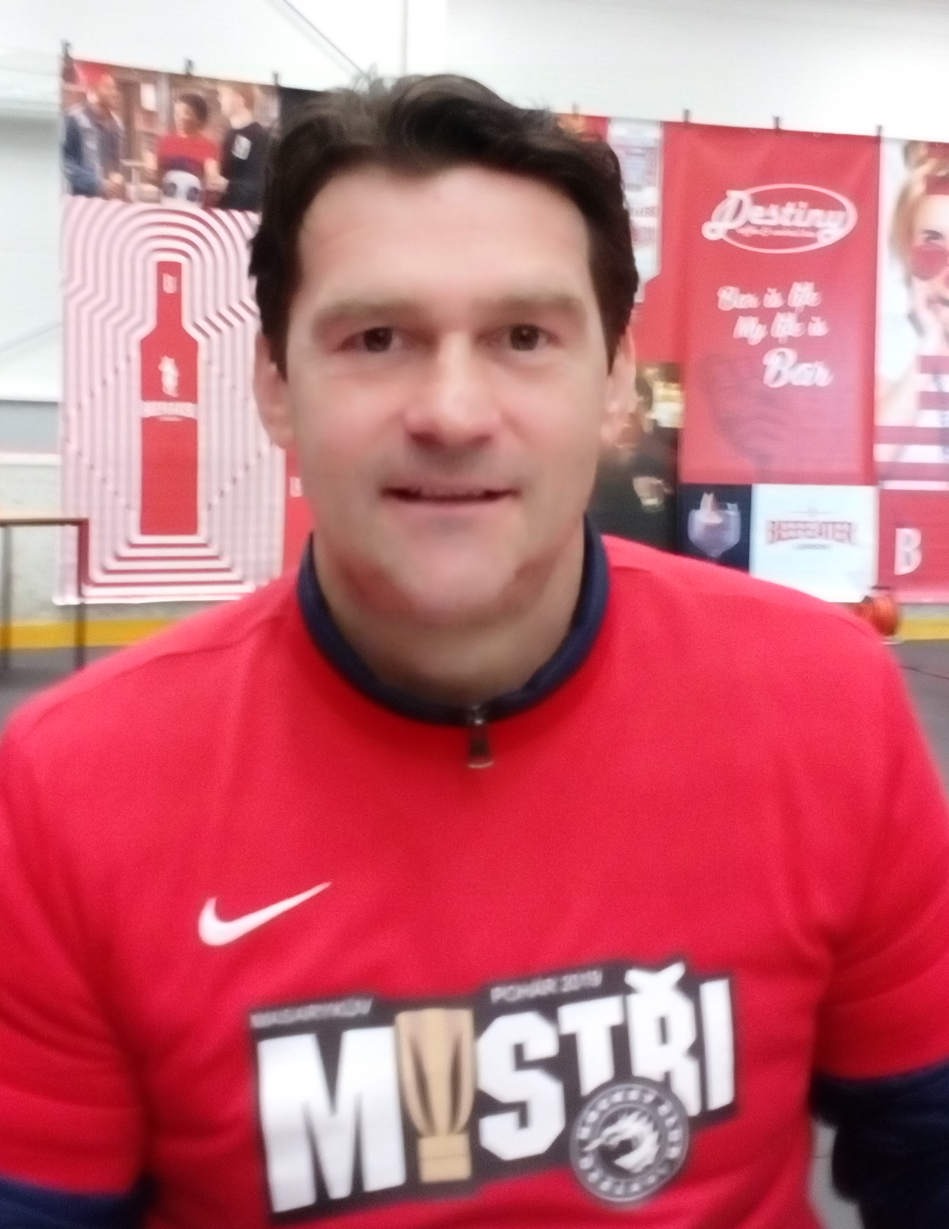 Po zakončení sezóny 2018/19 v malé Werk Areně